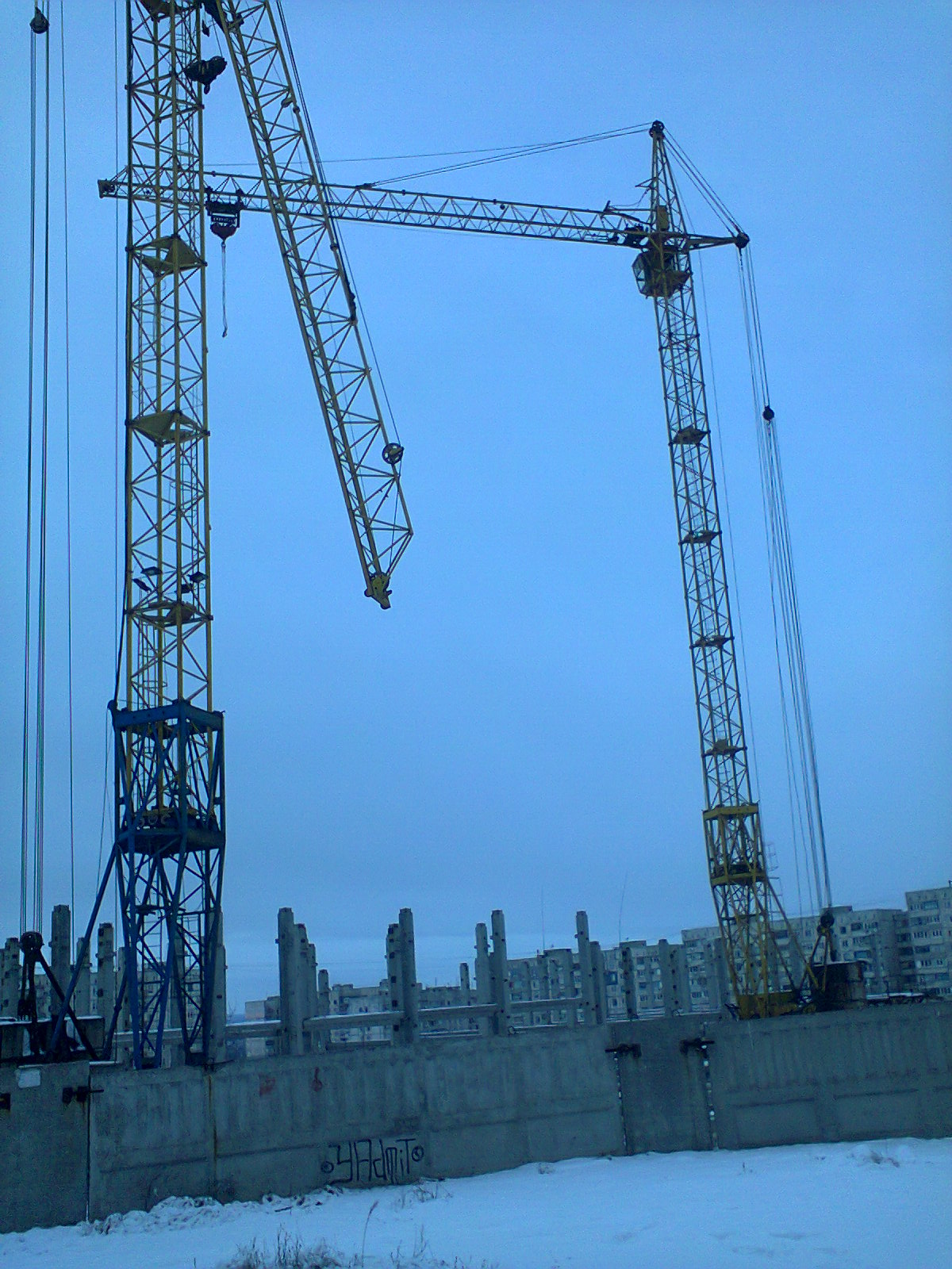 23 МКР Мариуполя